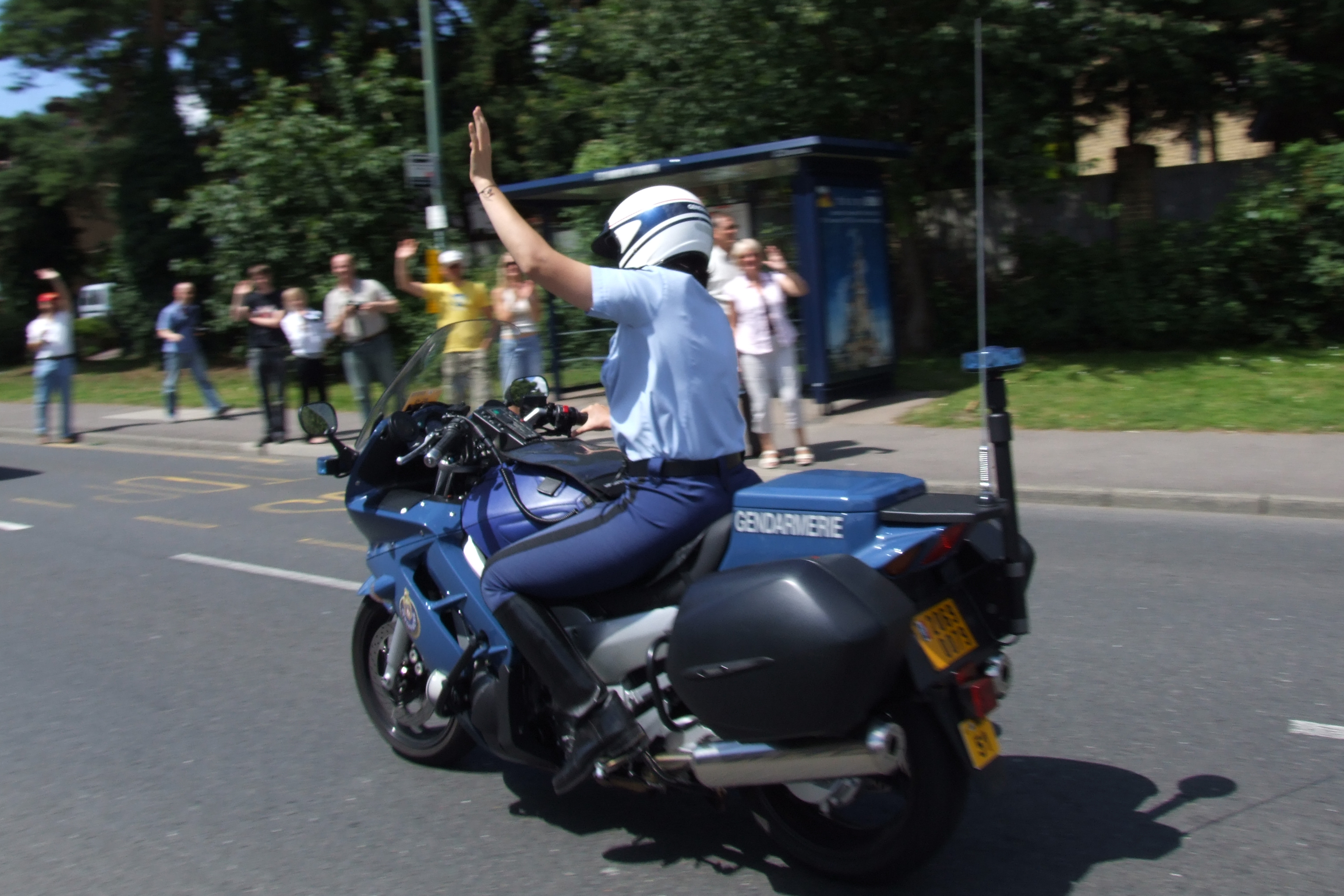 Gendarmerie